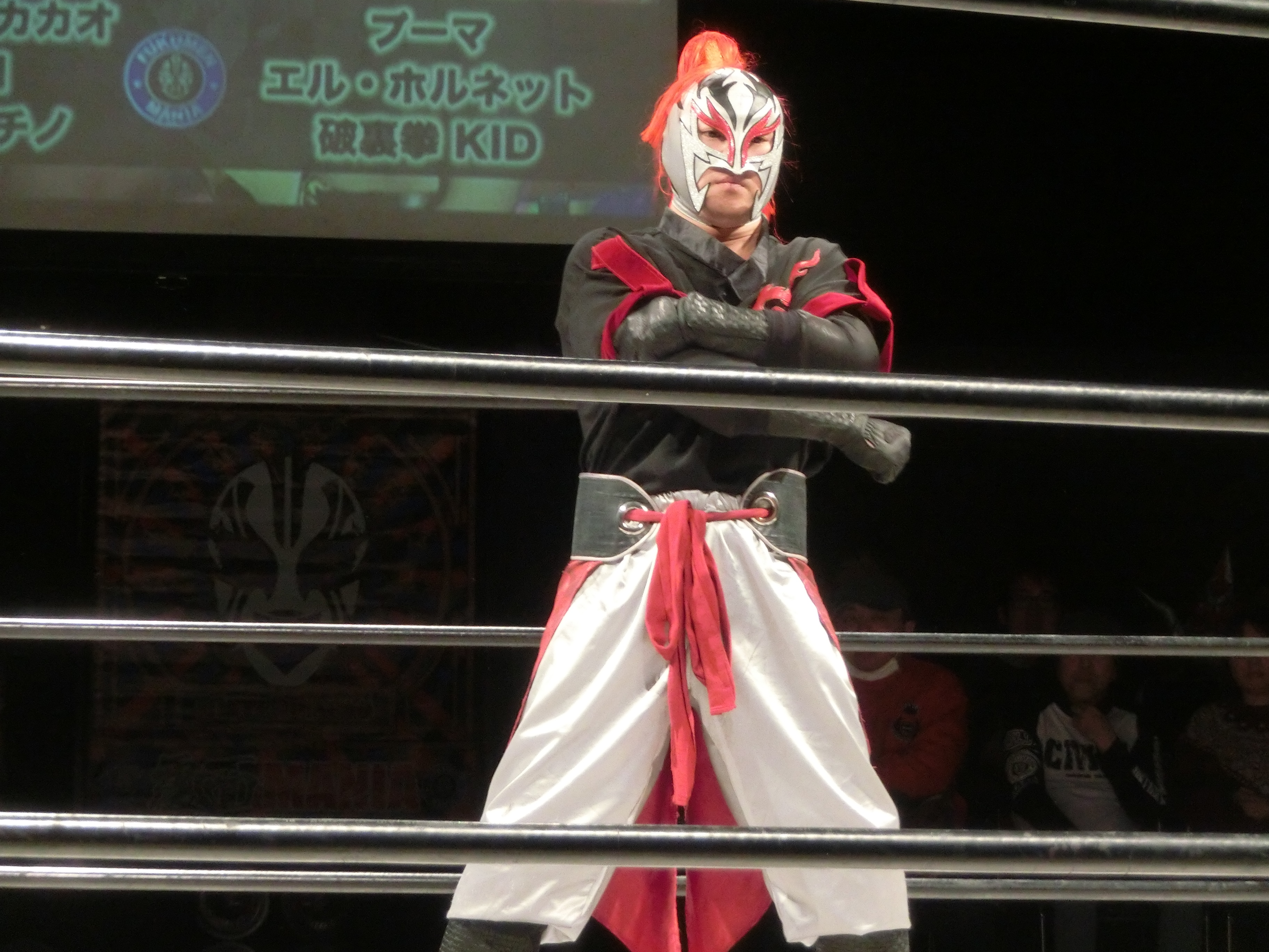 FUKUMEN-MANIA201802